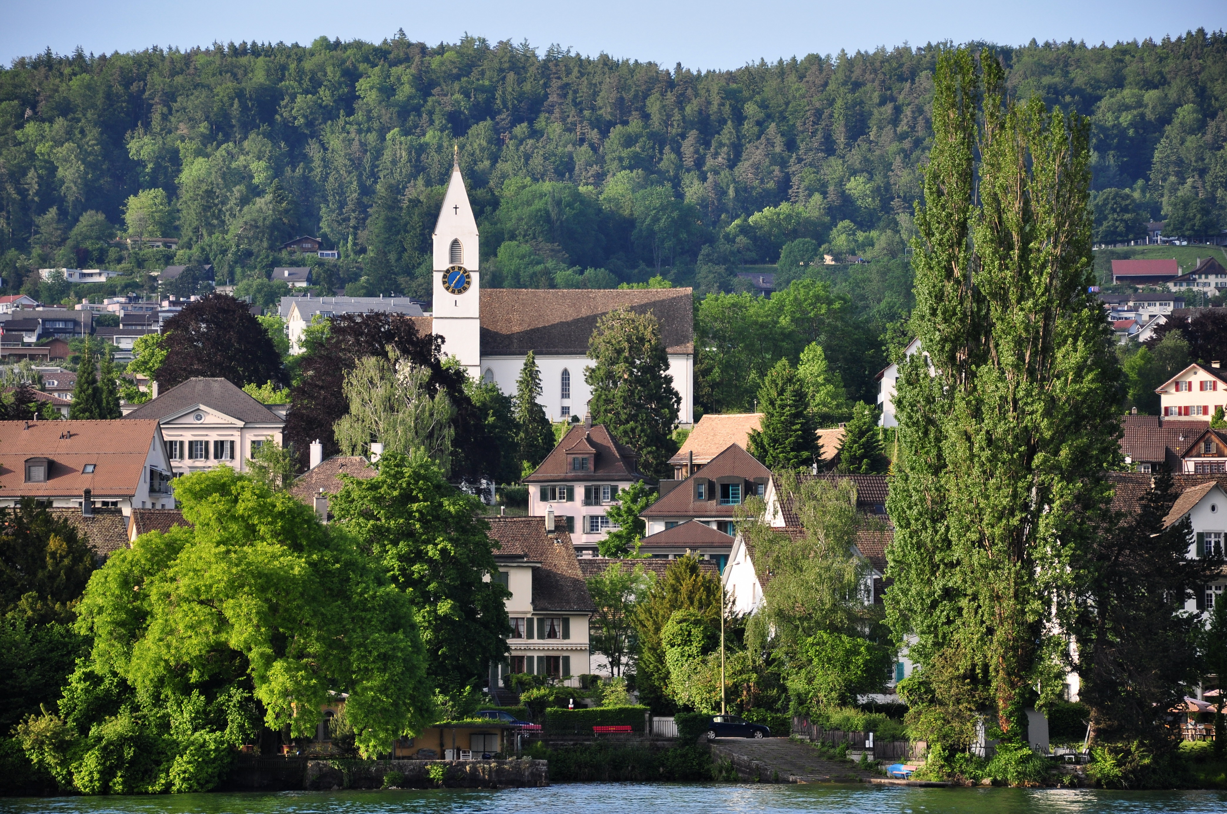 Löwenhaab, Männedorf (Switzerland) as seen from ZSG paddle steamship Stadt Zürich